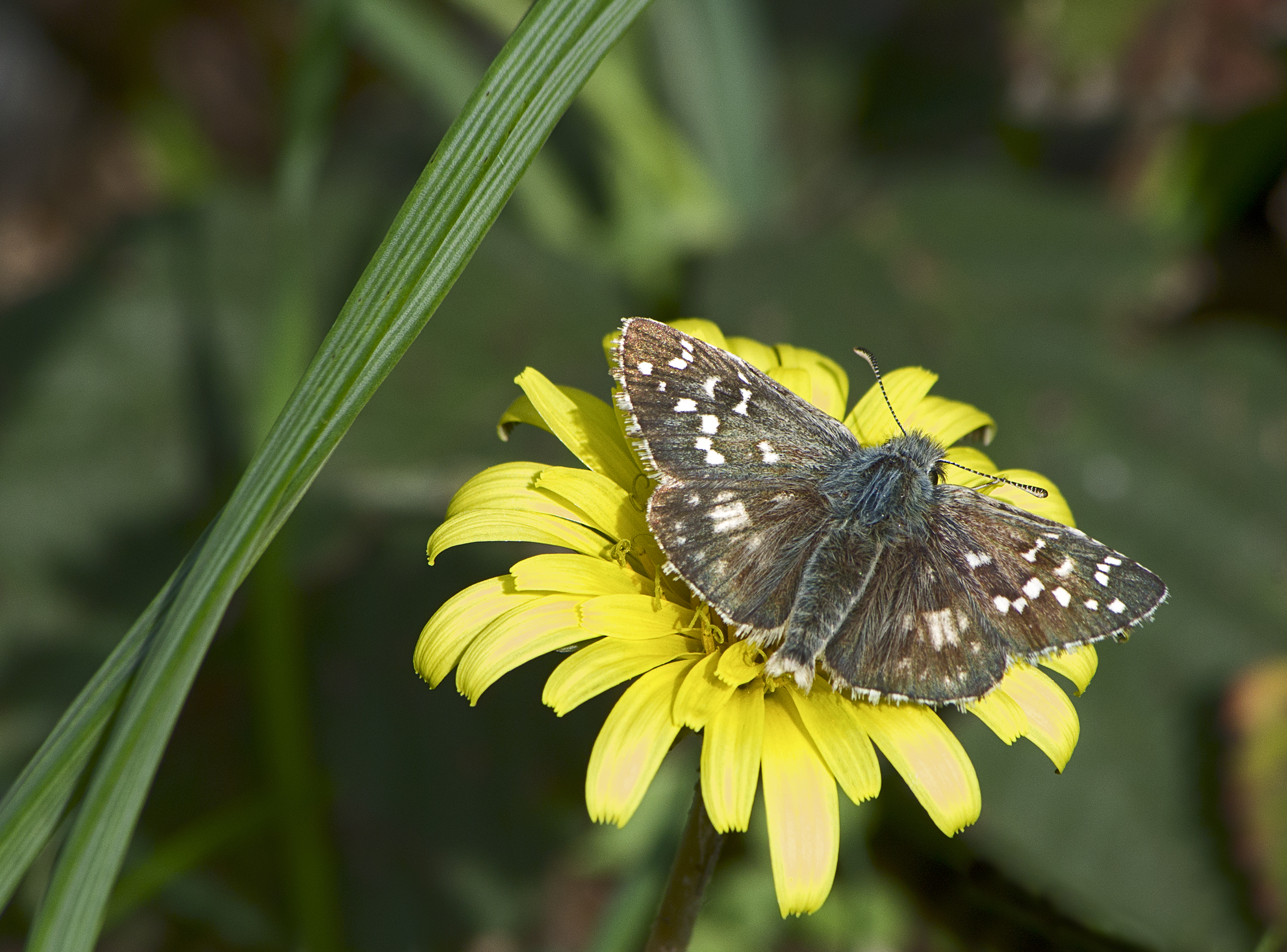 Распространена во всей Европе, хотя является обычным видом на юге и отсутствует на Британских островах и в большинство стран Скандинавии. It is found throughout Europe although it is commoner in the south and absent from the British Isles and most of Scandinavia.